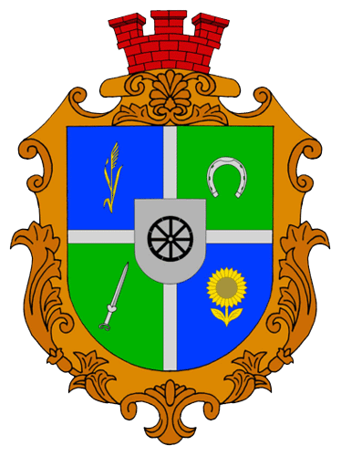 Герб Мачухівської громади